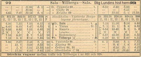 Tidtabell för Sala-Tillberga Järnväg